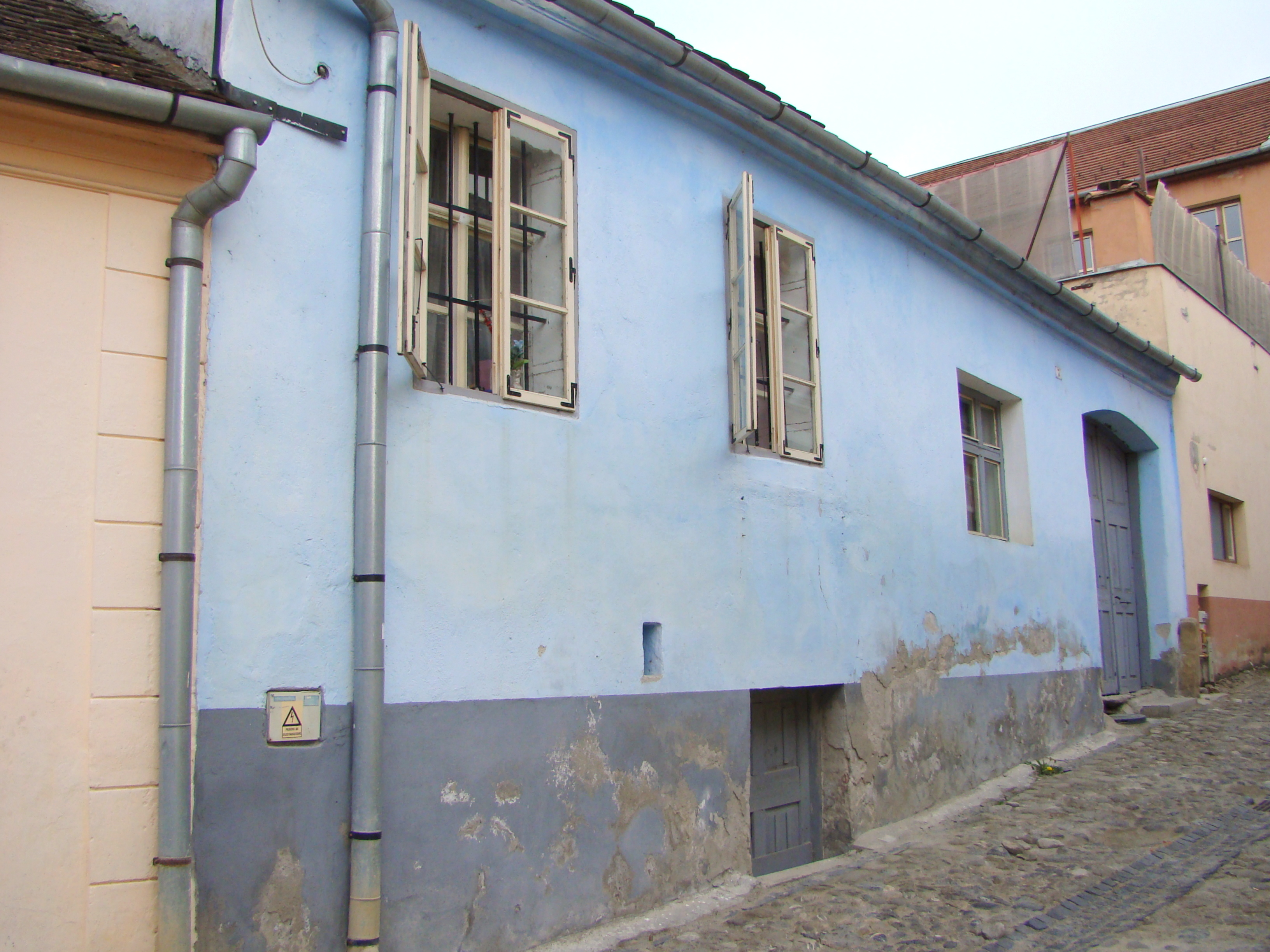 Casă, municipiul Sighișoara, str. Tâmplarilor 7 casa: 1700 - 1725, sec. XX; poarta: 1800 - 1850